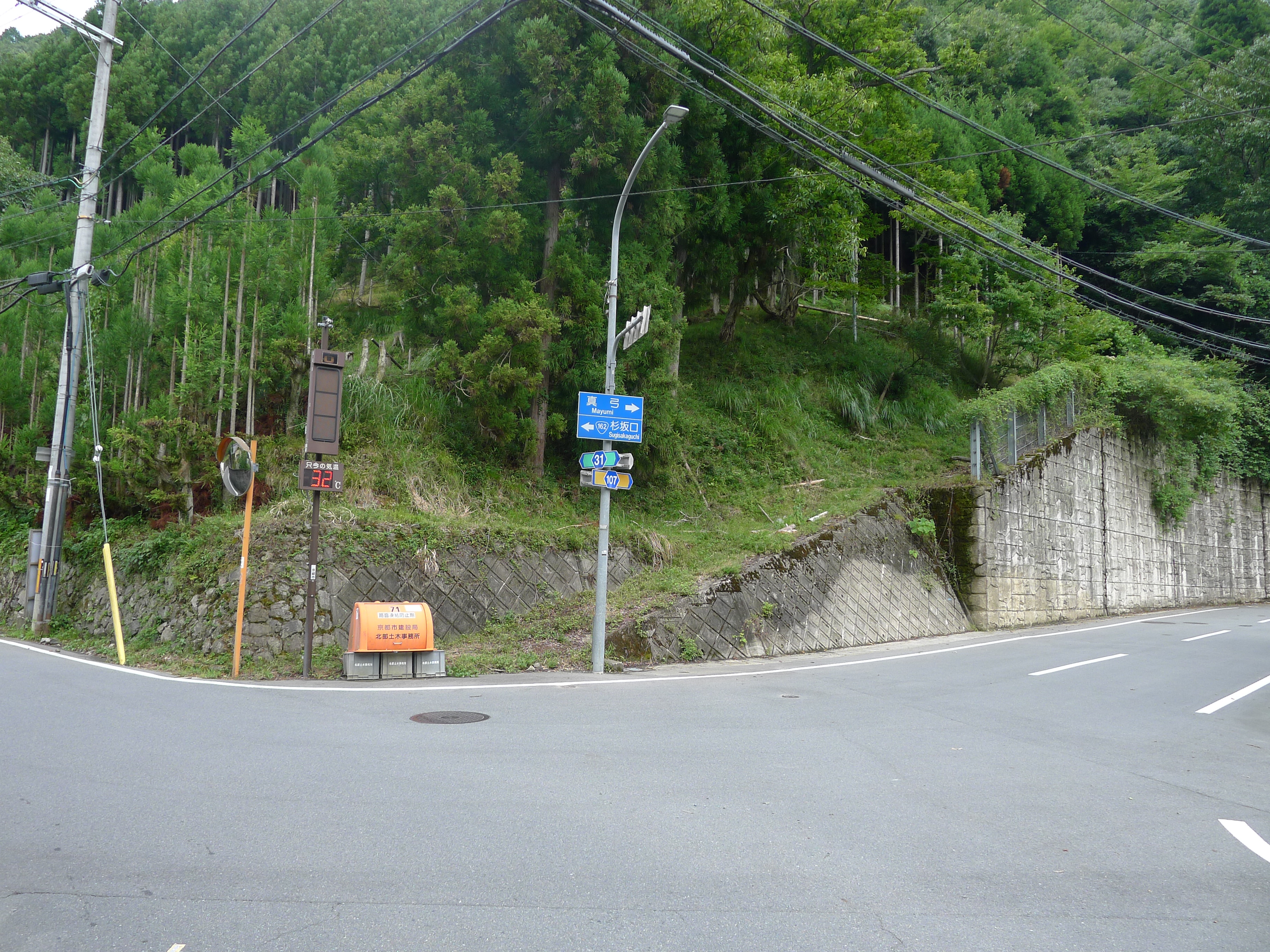 京都府道31号と107号の合流点（京都市北区杉坂）